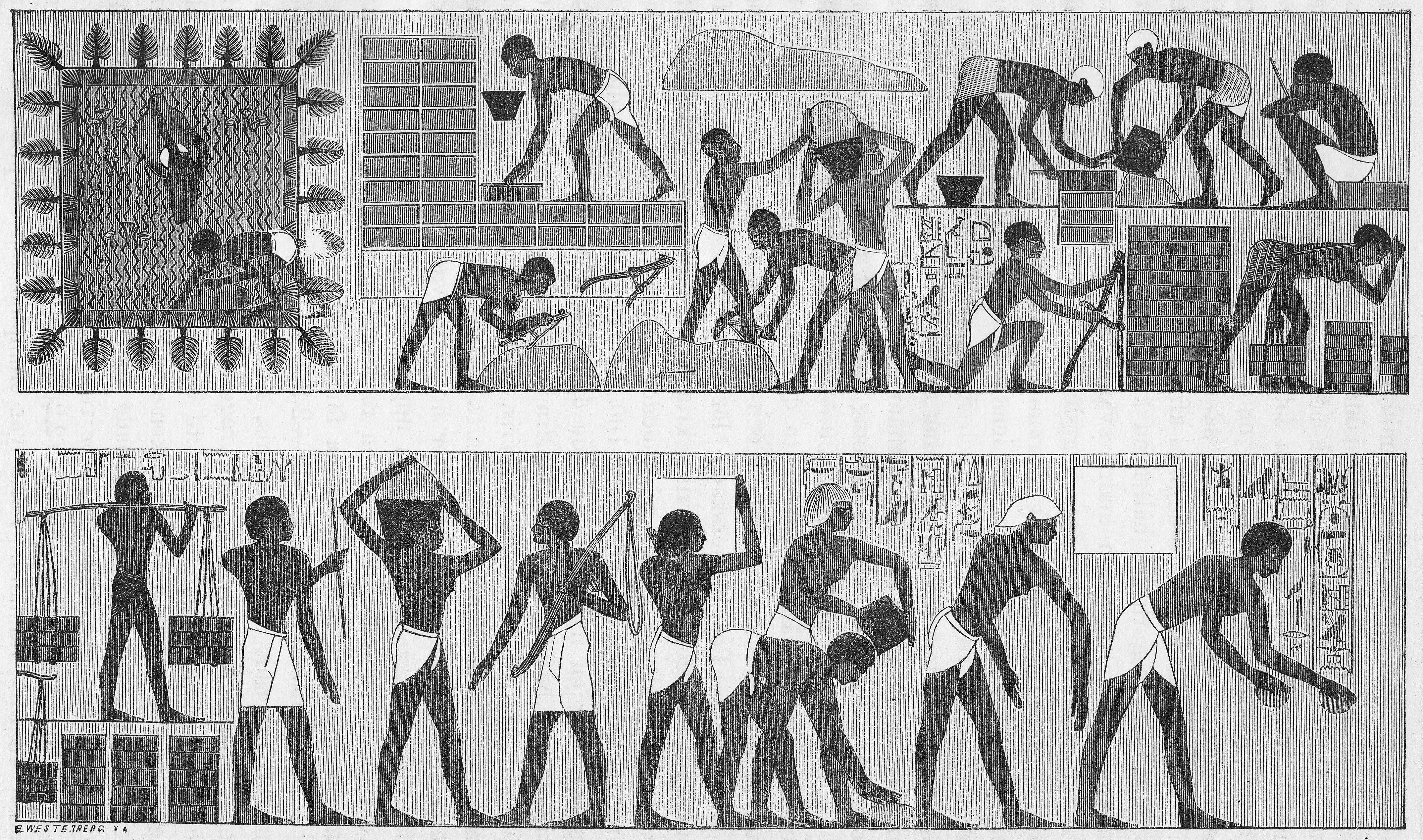 Illustration från "Illustrerad verldshistoria utgifven av E. Wallis. band I" Egyptiska fångar sysselsatta med träldomsarbete. Efter en väggmålning i en graf i Thebe.Illustration from "Illustrerad verldshistoria utgifven av E. Wallis. band I": Egyptian prisoners at slavery. From a wallpainting in a grave at Thebe.